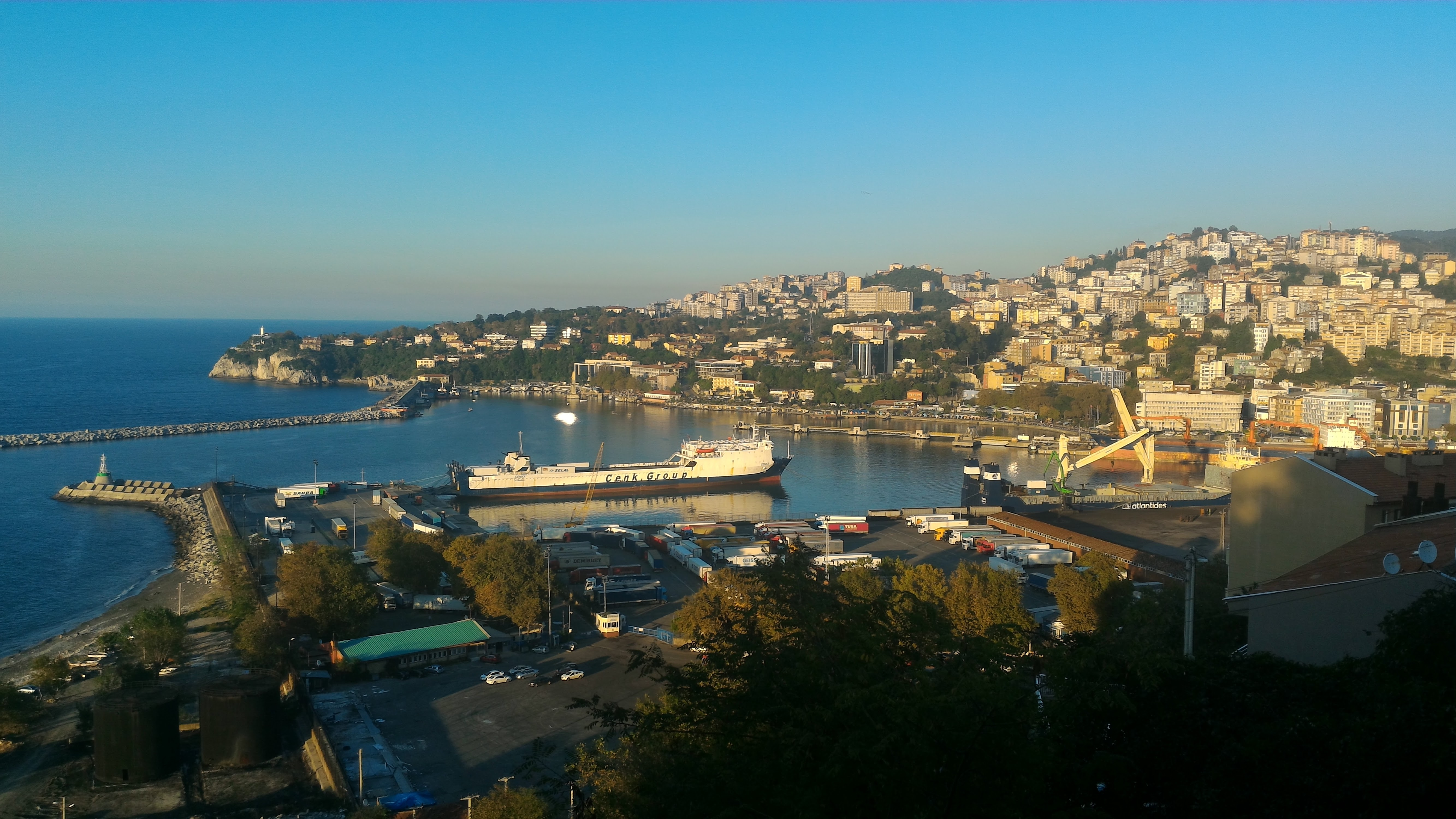 Zonguldak